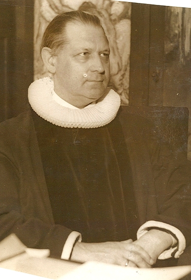 portrett, mann, sogneprest, professor, brystbilde, talerstol.